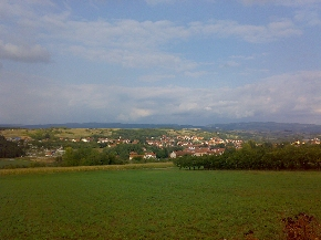 Batinac,opština Ćuprija